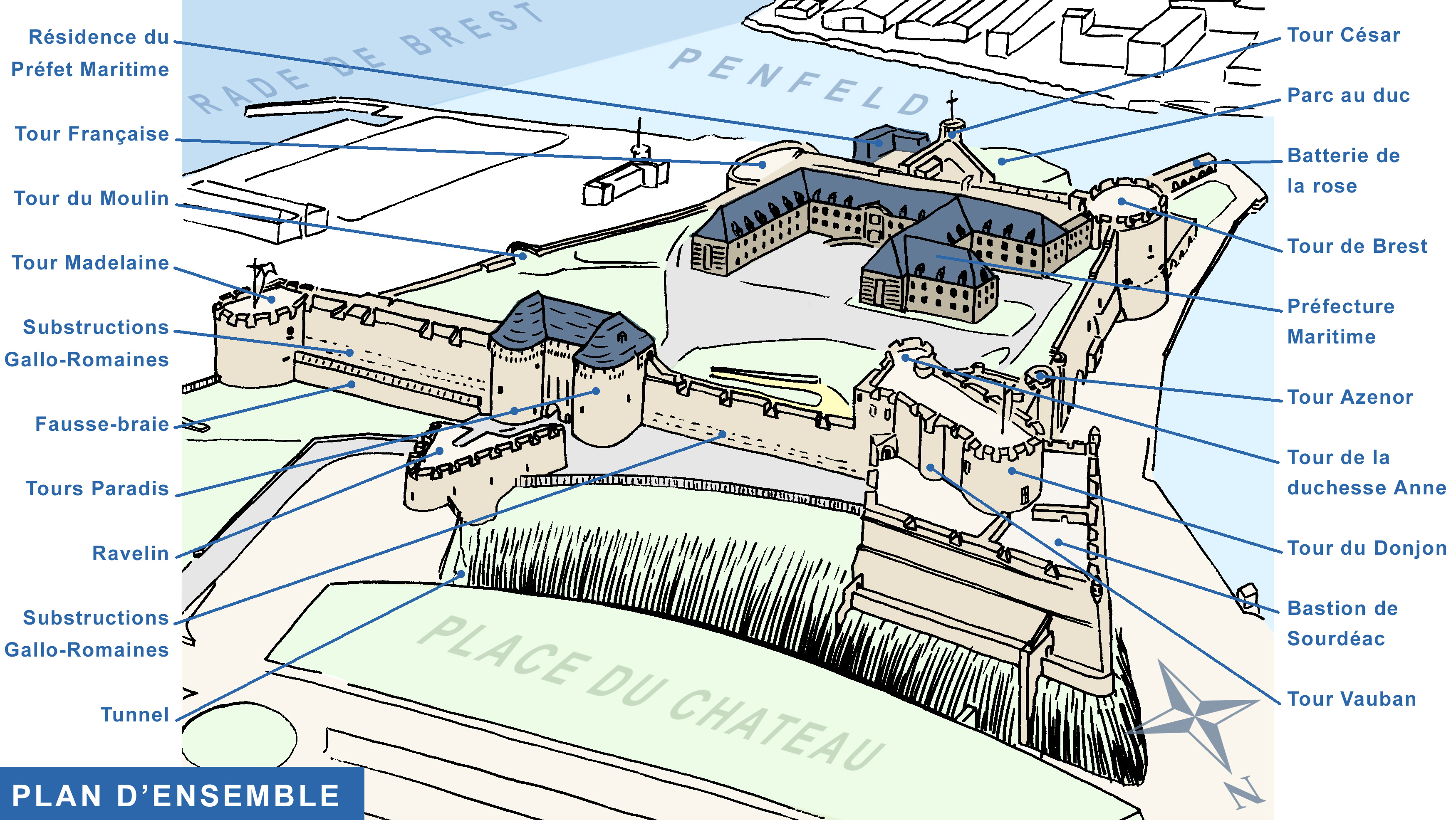 Vue cavalière du chateau de Brest